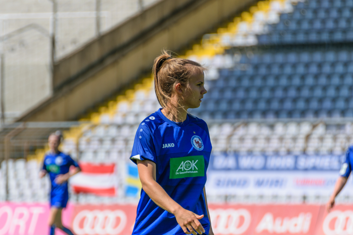 Anna Gasper vs Bayern Munchen - Frauenbundesliga